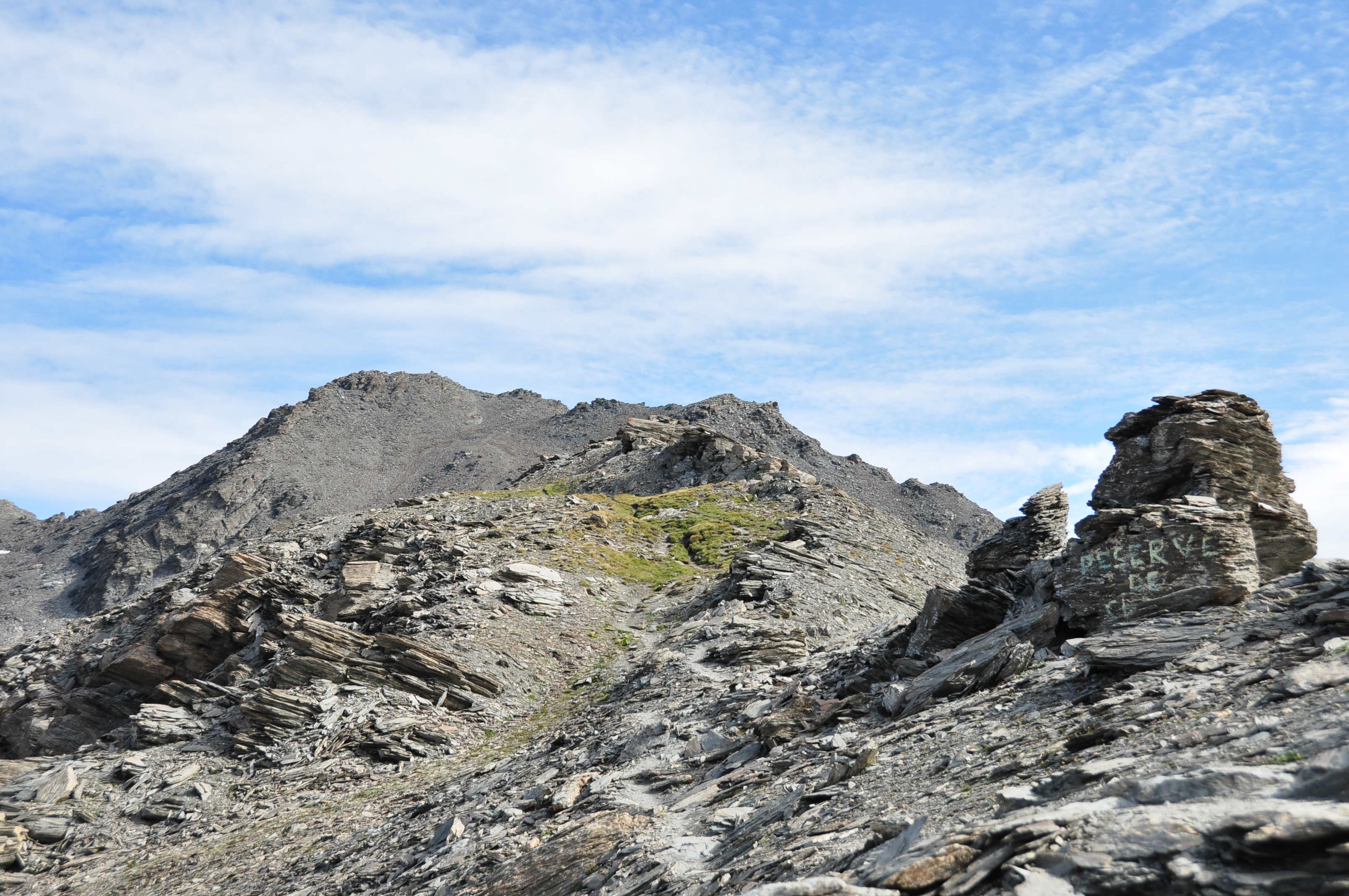 Versant français du Grand Glaiza.